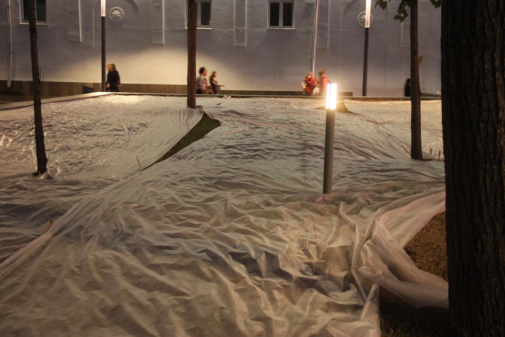 Воздвиженка, сквер на террасе у "Художественного". Нет деревьев? Воткнём палки с ламочками!